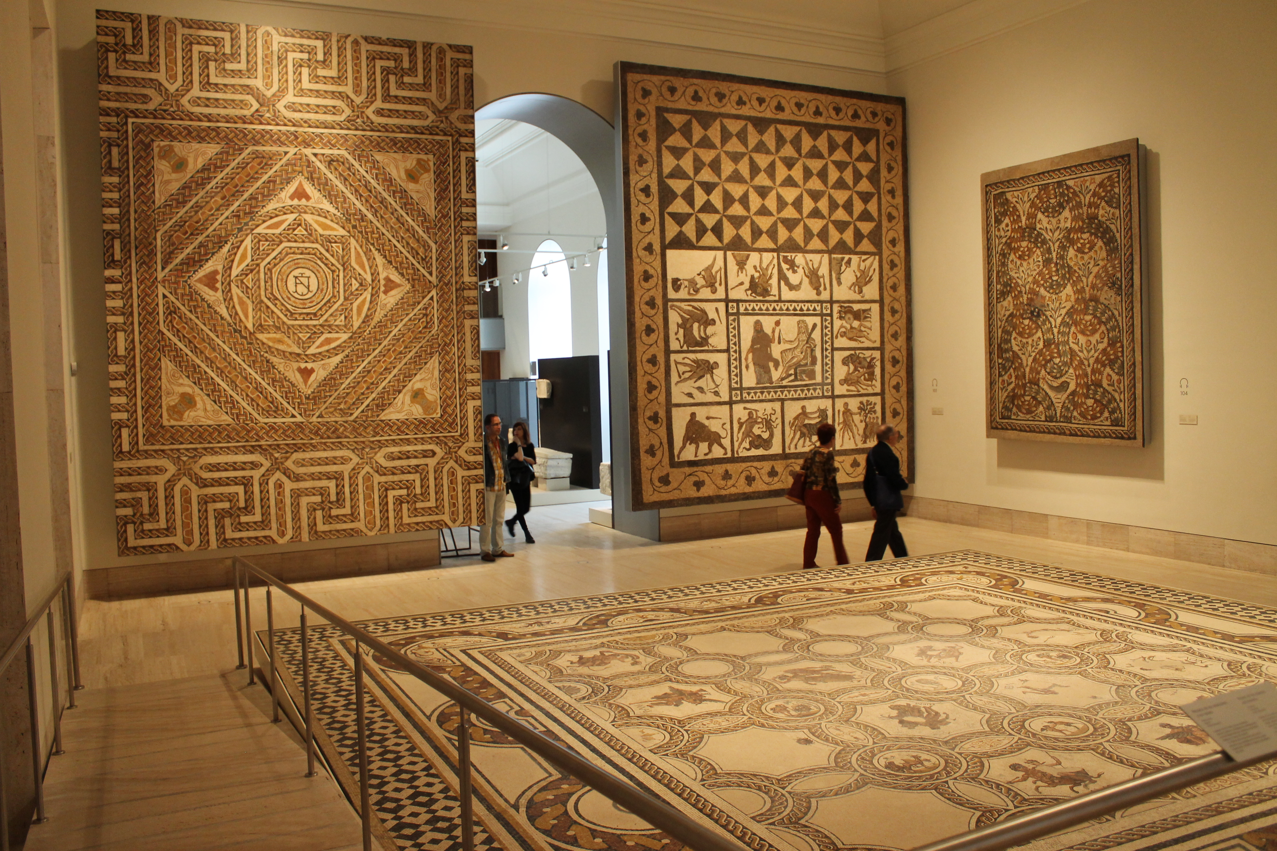 Mosaicos romanos